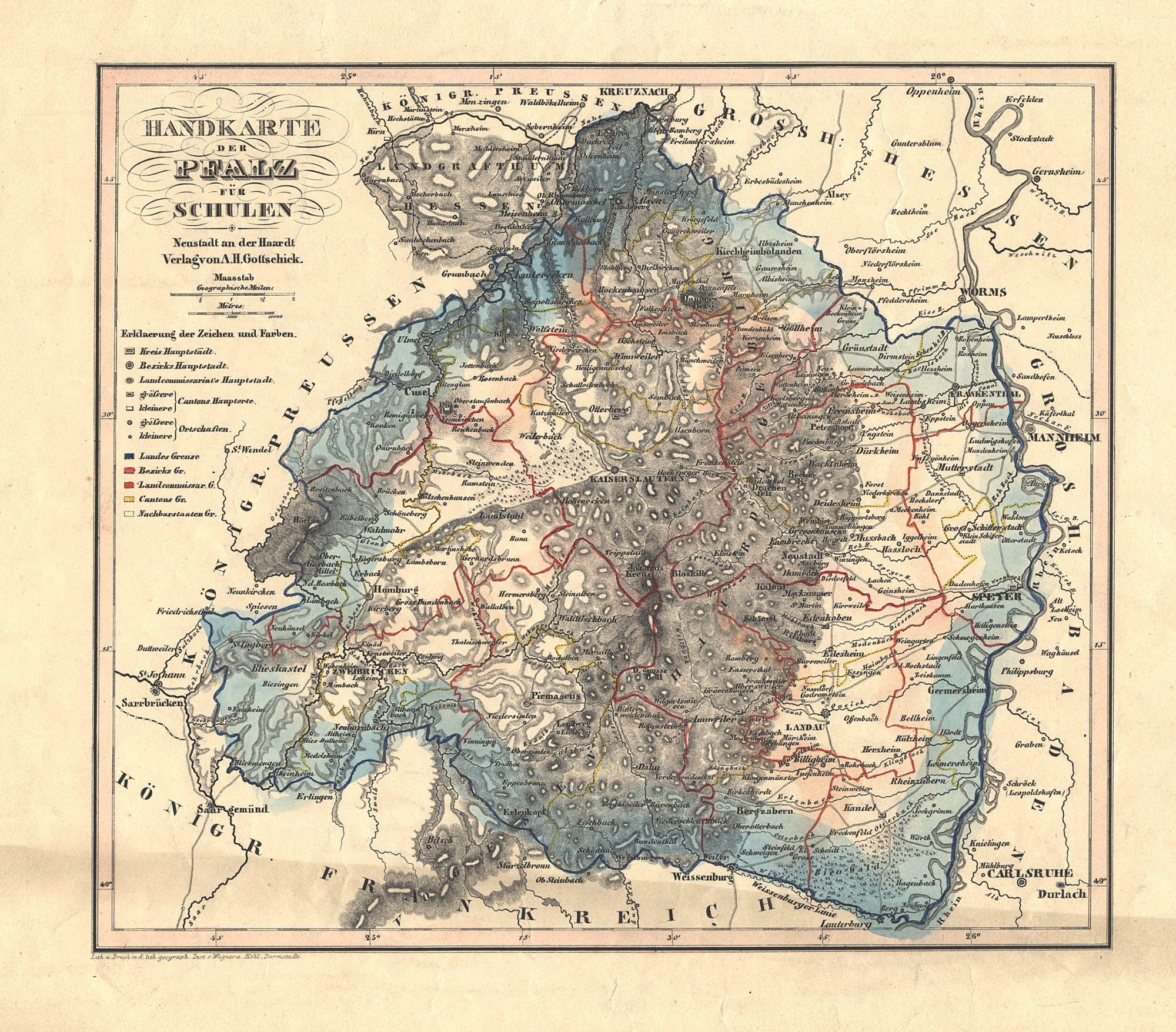 Handkarte der Pfalz für Schulen, 1844 Diese enthält auch die Verwaltungsgliederung des Rheinkreises 1816 – 1837 bzw. der Pfalz 1837 – 1862 mit Landkommissariaten und Kantonen, bzw. der Bezirksämter ab 1862.